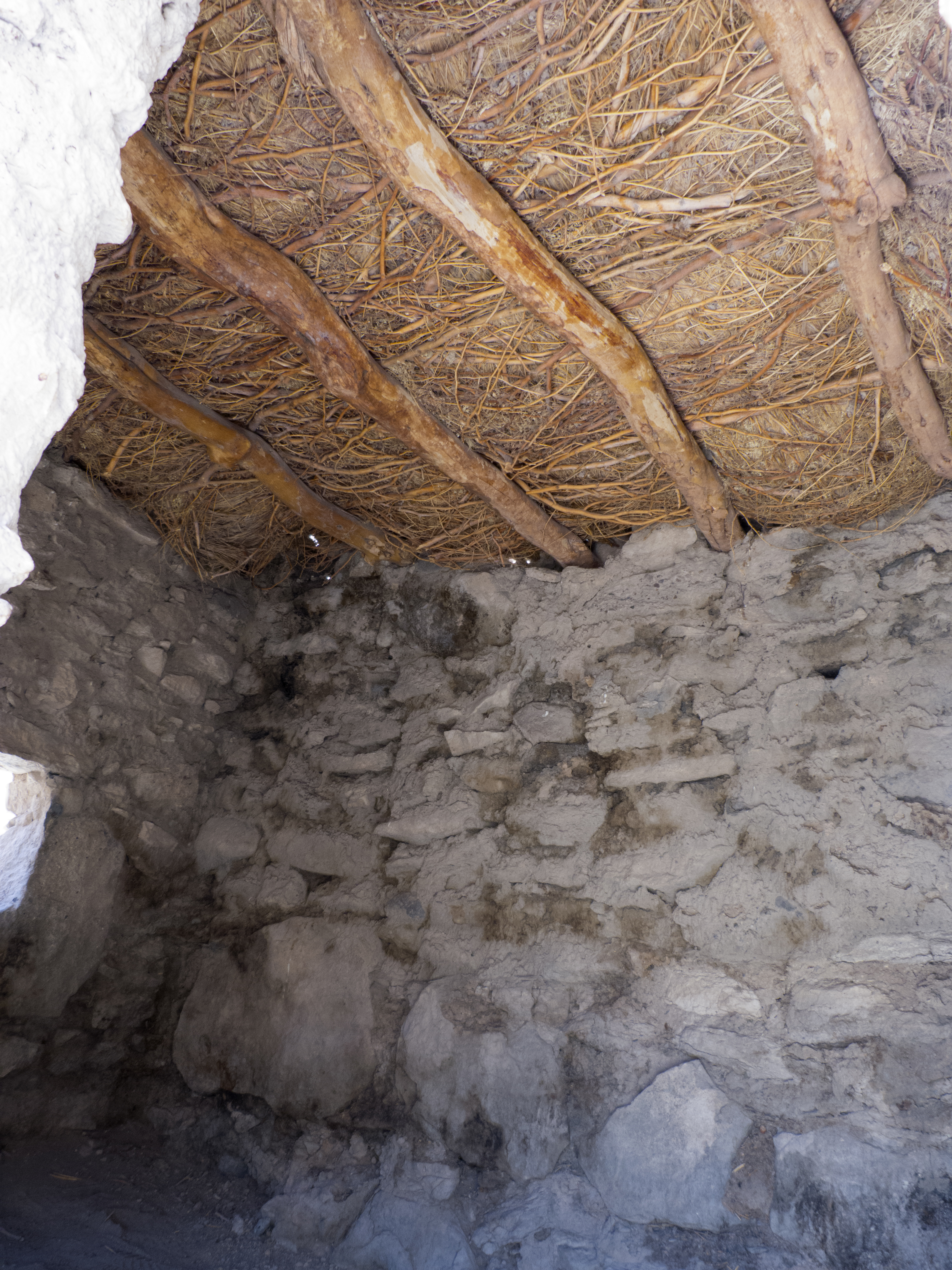 Pucará de Lasana - Esta es la vista del interior de una de las edificaciones, se aprecia cómo la forma de el techo, el método de construcción y materiales utilizados This is a photo of a national monument in Chile: 299